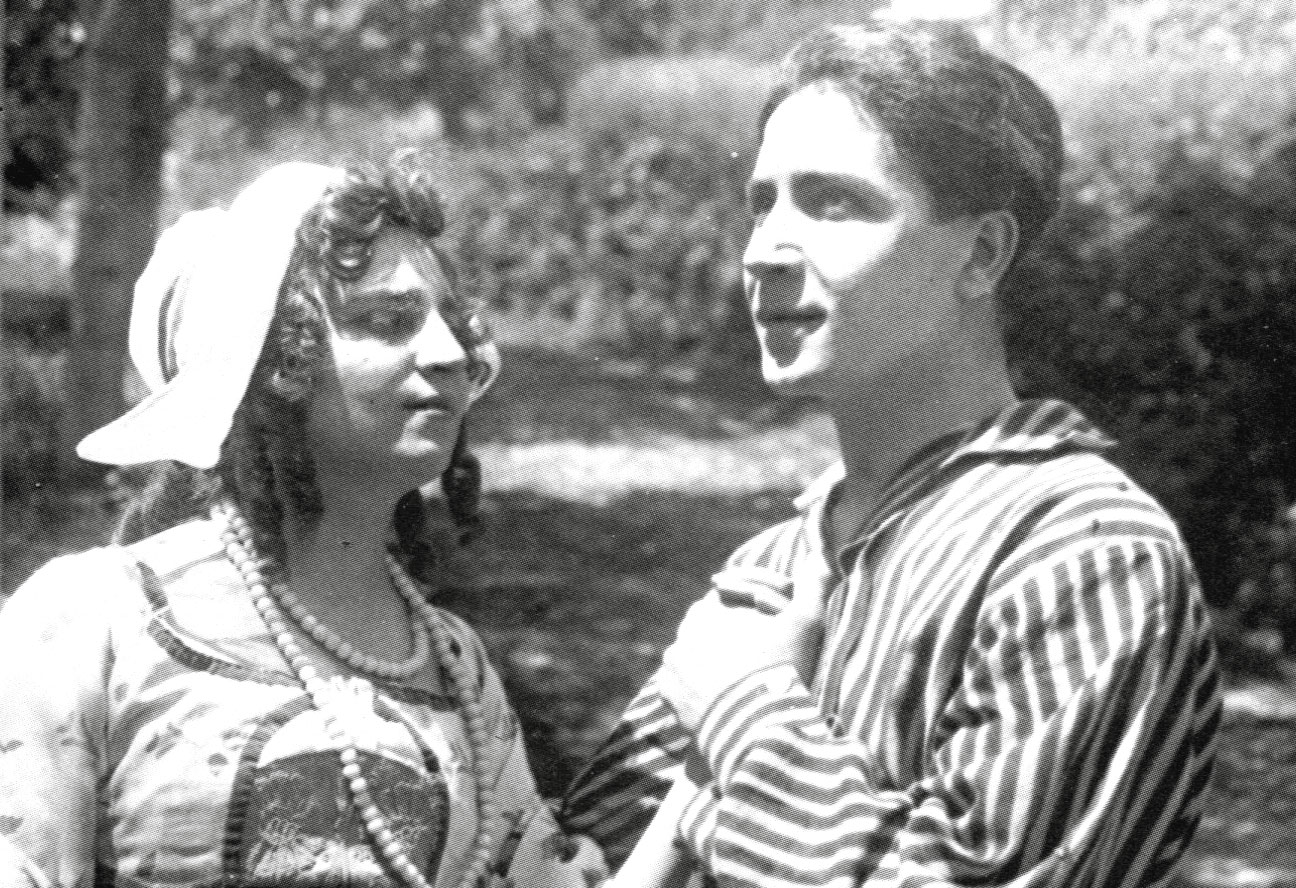 Foto di scena dal film muto la vampa 1916 - dirett A. Consalvi- Bice Waleran e Luigi Pavese